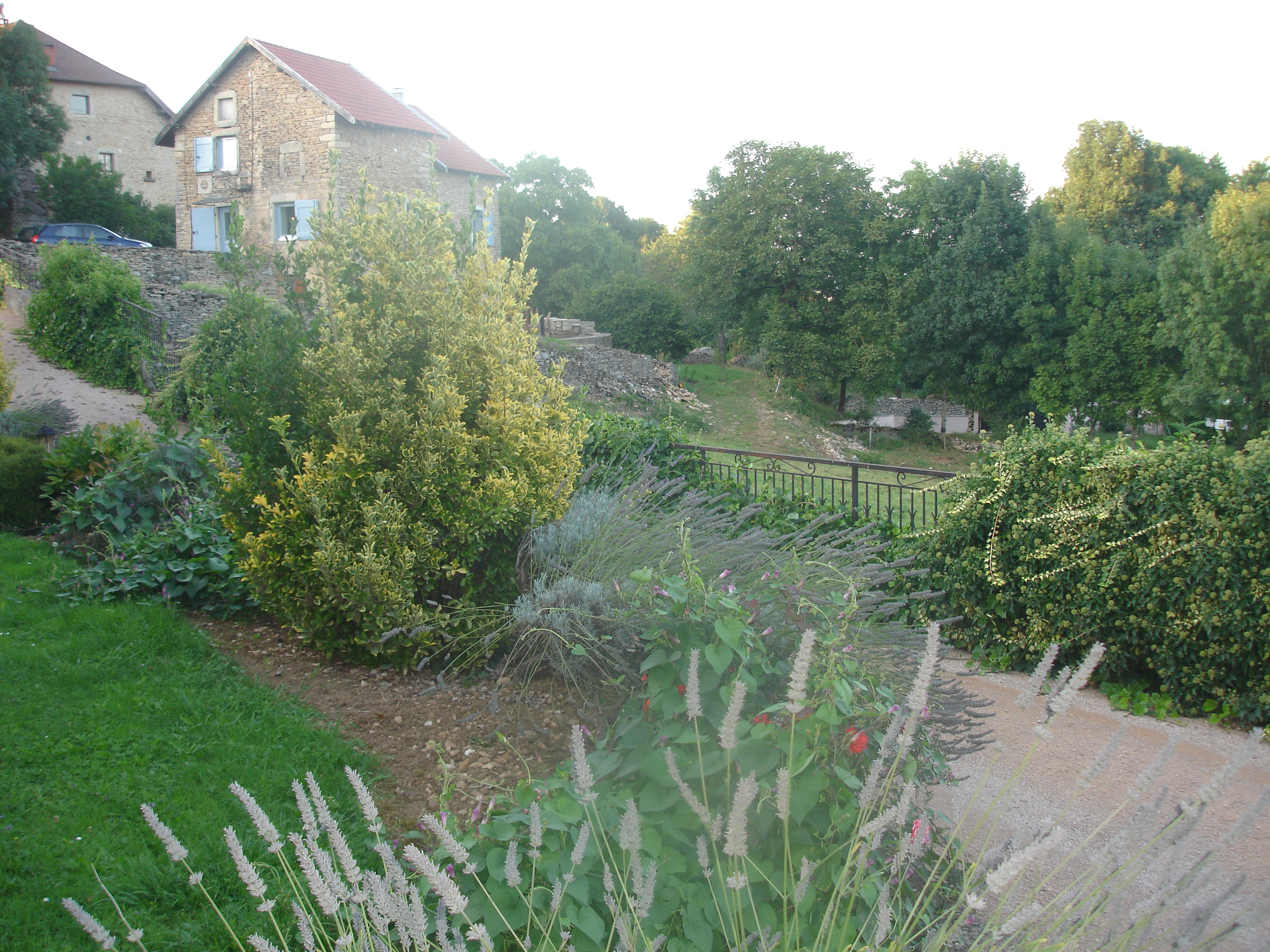 Annoisin-Châtelans (Isère) : vue de Châtelans le haut